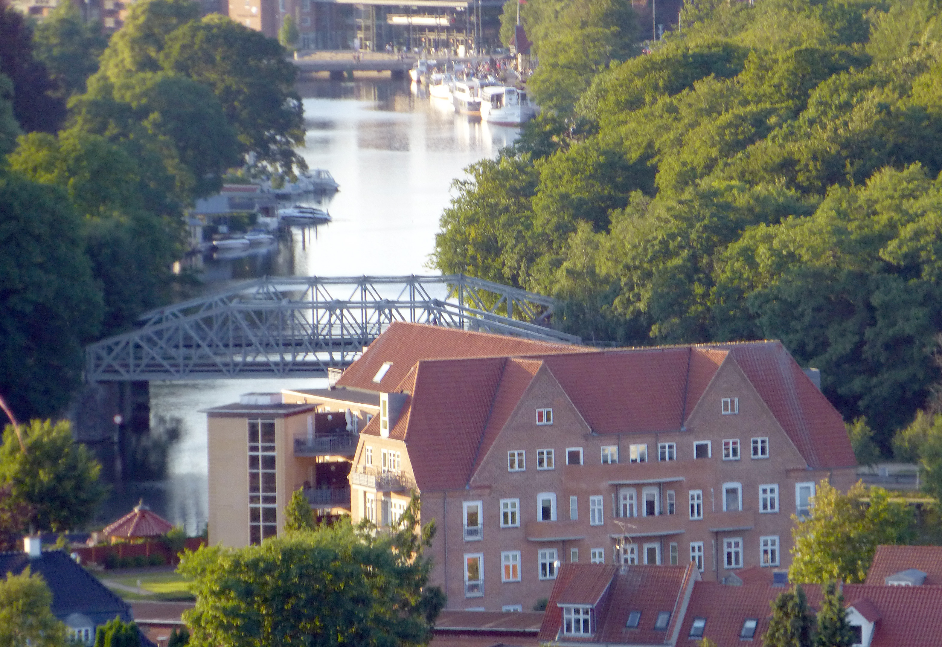 Gudenåhus, tidligere Gudenå Kurbad og Junkers Gymnastikinstitut ved Remstrup Å Silkeborg